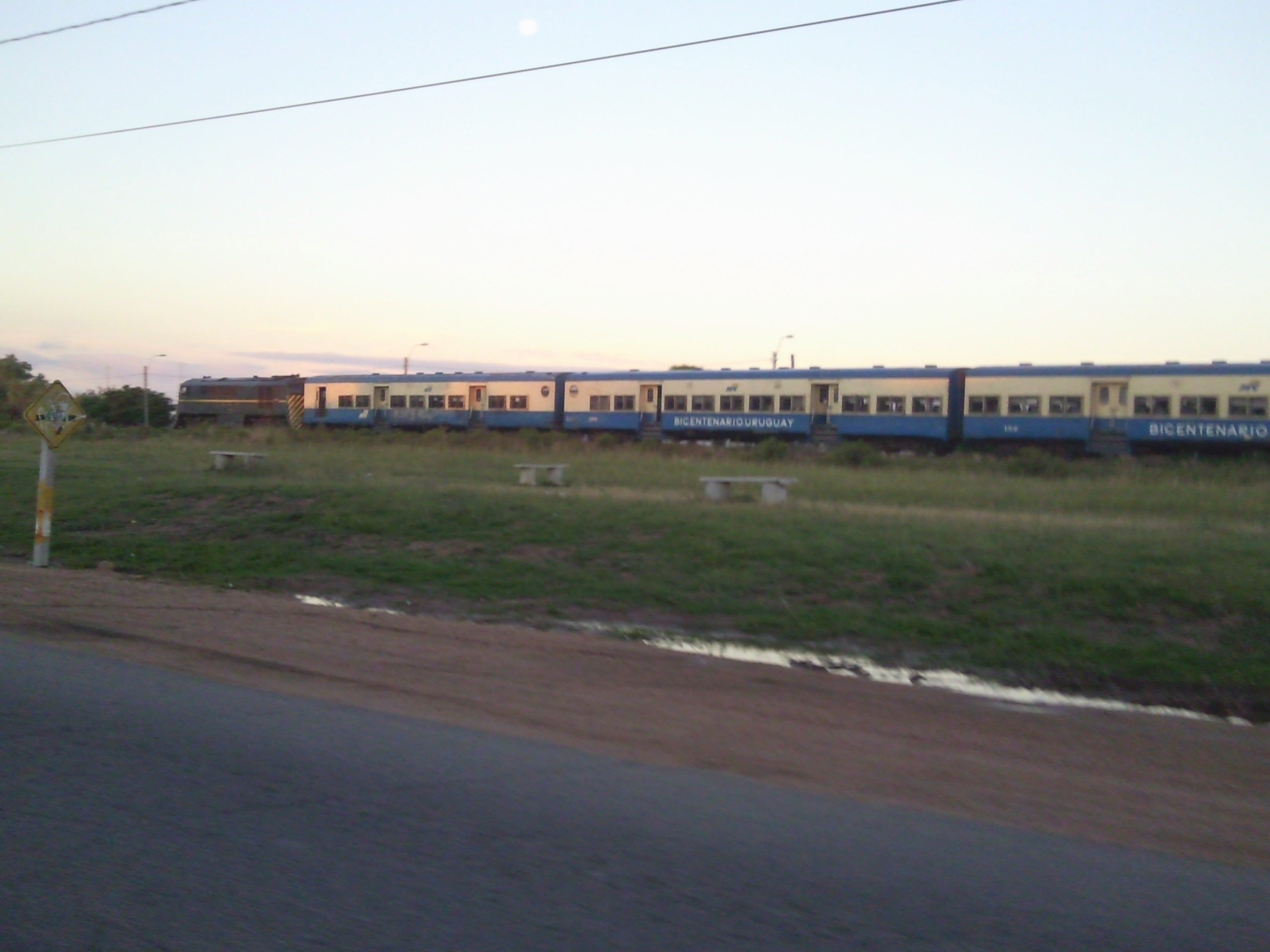 Tren de AFE por Las Barreras